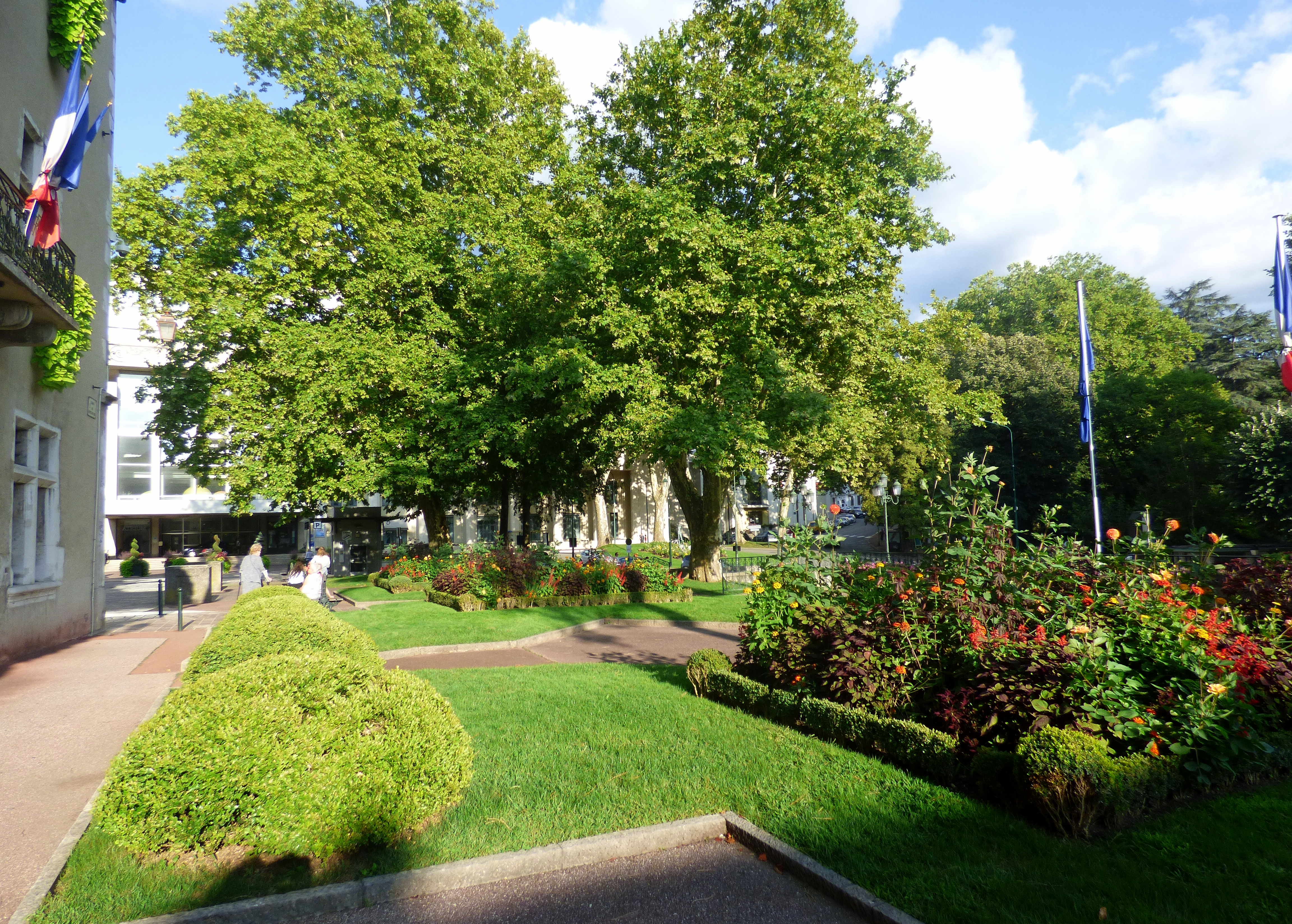 Le square de l'hôtel de ville d'Aix-les-Bains, en 2017. Vue orientée vers le sud-est.